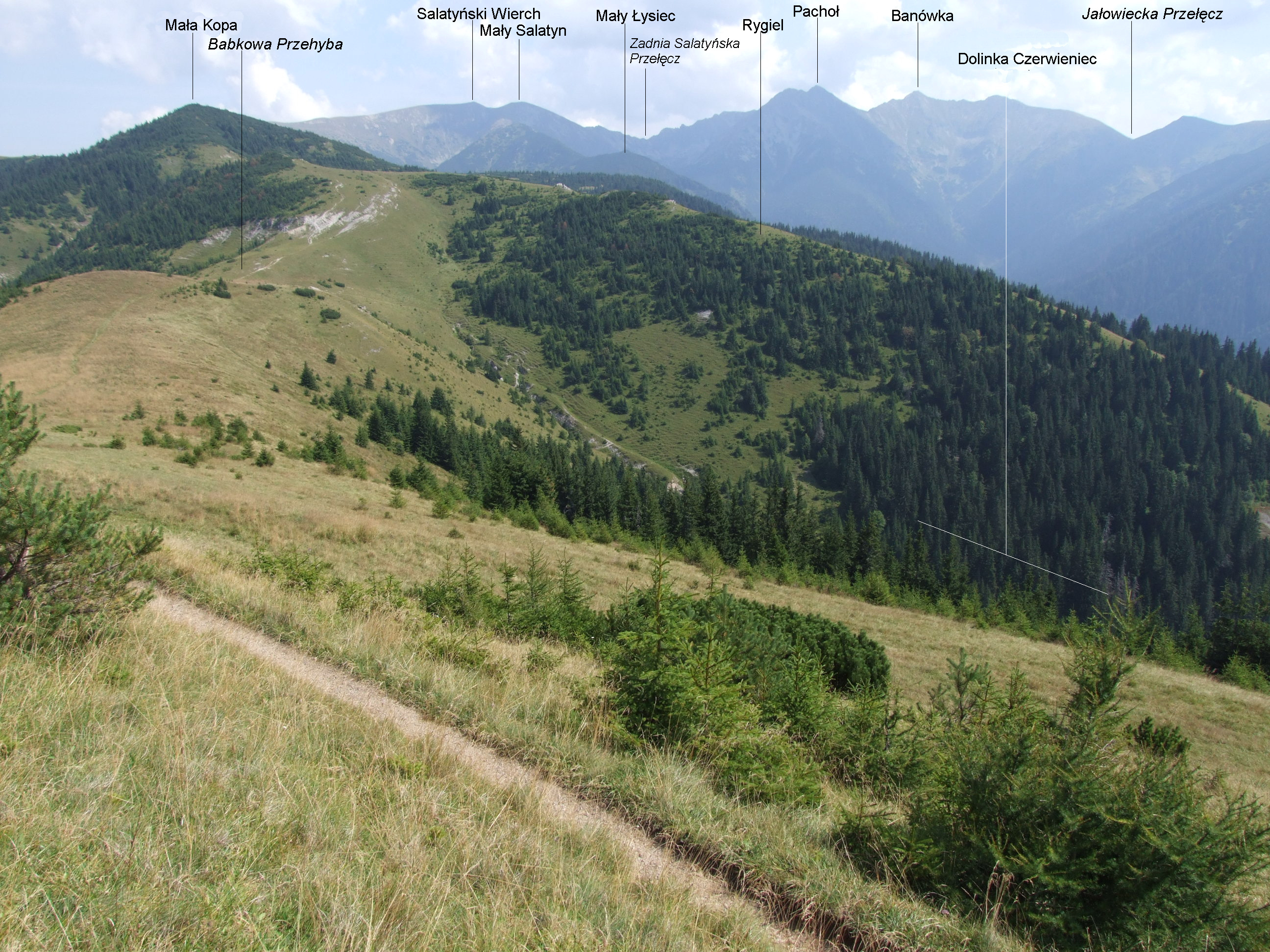 Widok z grzbietu Babek